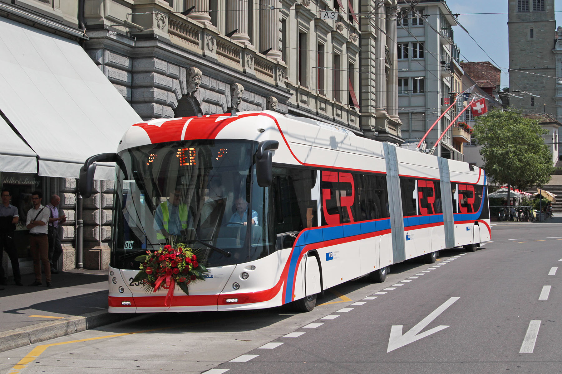 Zur Einweihung des ersten Wagens im neuen BHLS-Design für die Luzerner Linie 1 trägt Hess/Vossloh Kiepe lighTram Nr. 234 Blumenschmuck.